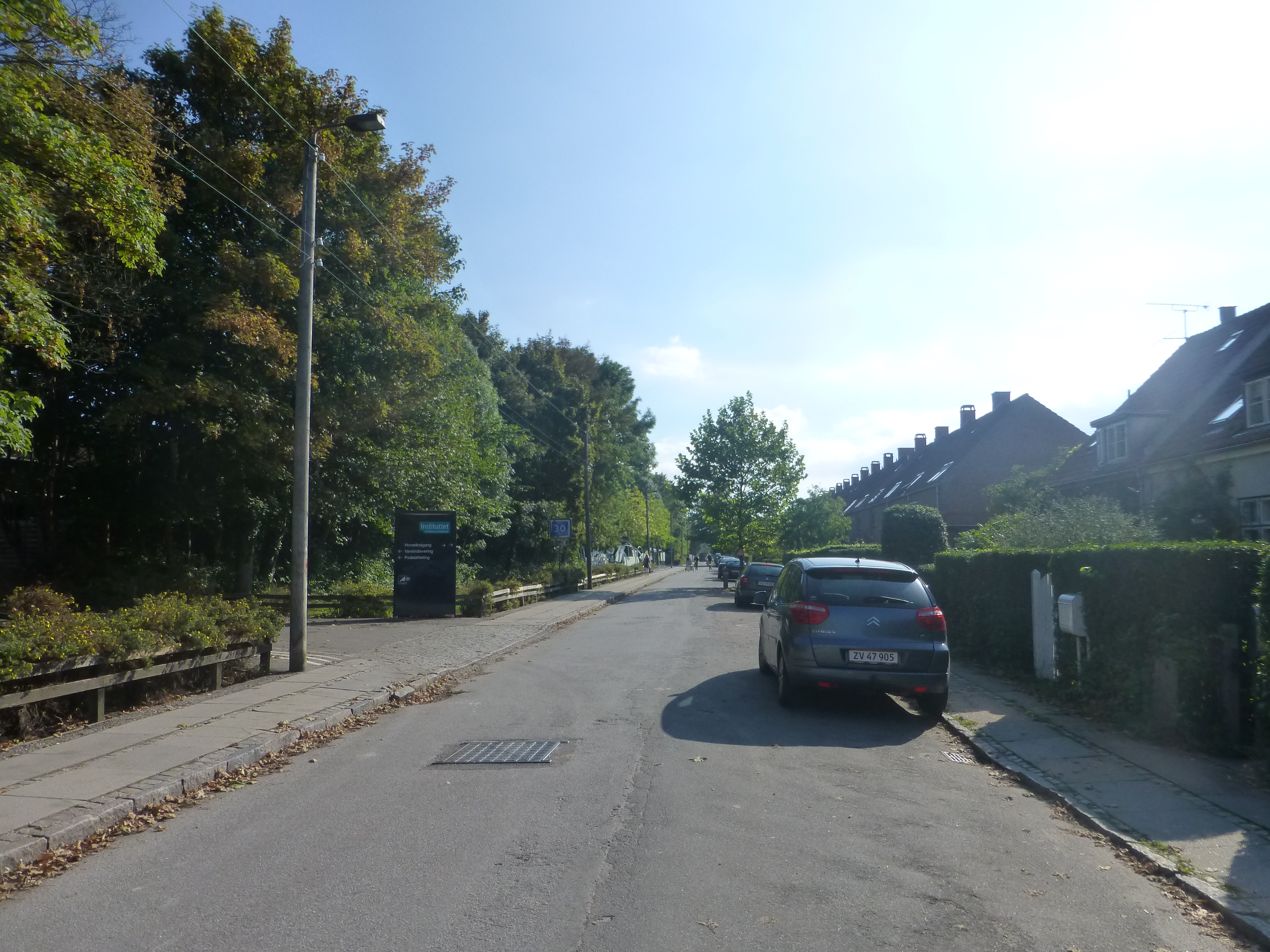 The street Rymarksvej in Hellerup in Copenhagen.